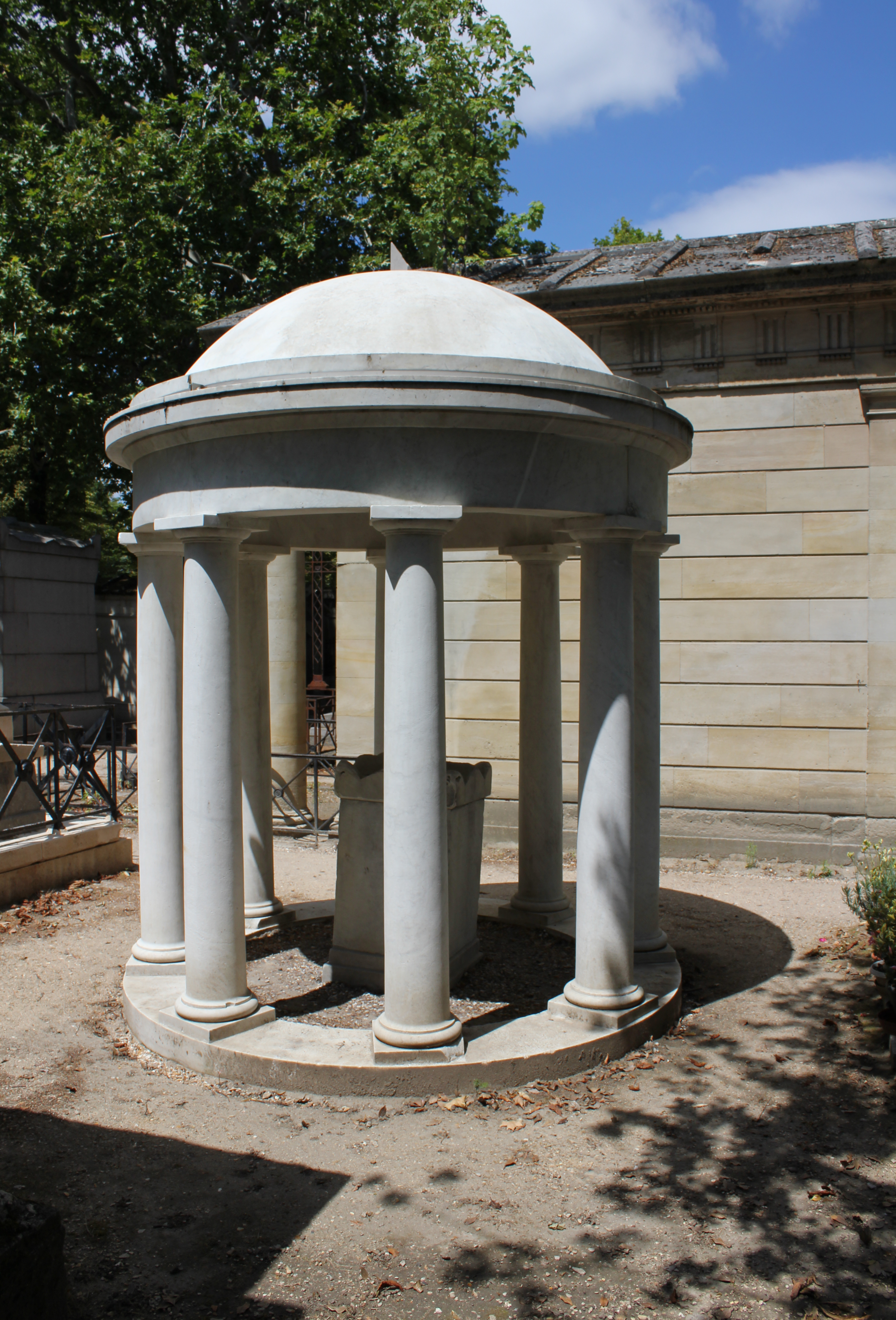 Sépulture de Mariano Luis de Urquijo (1768-1817), homme d'État espagnol. Rotonde en marbre blanc.vue d'ensemble